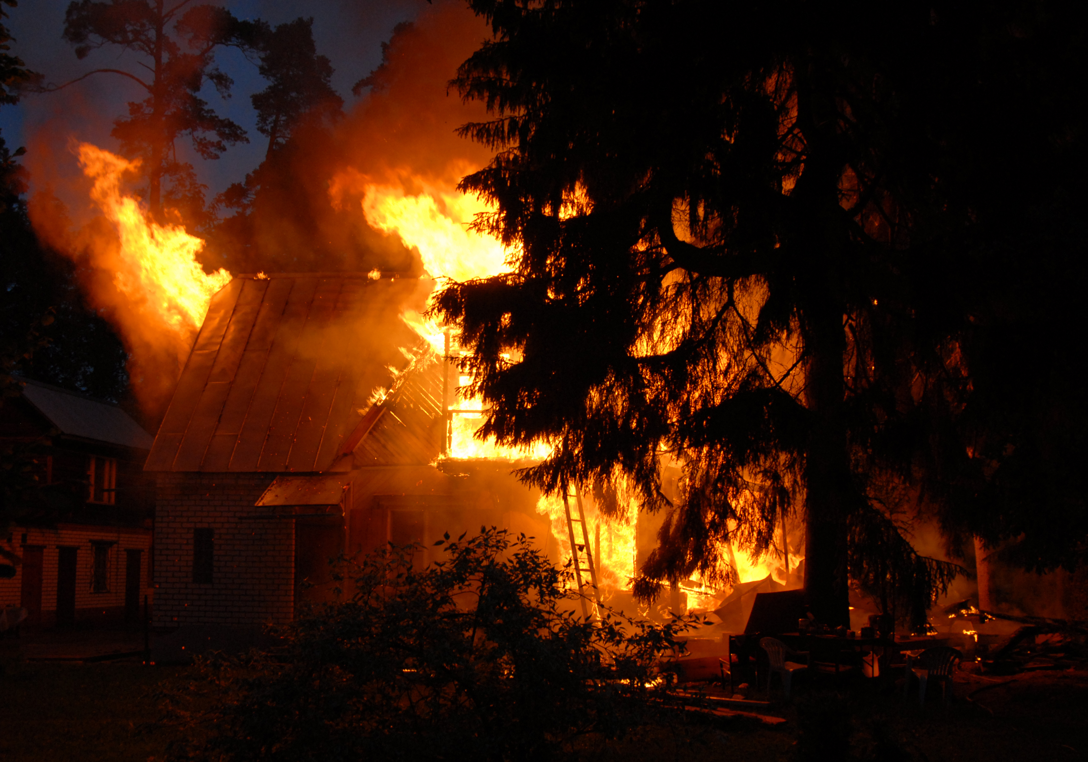 30/06/2008 Это ночной пожар